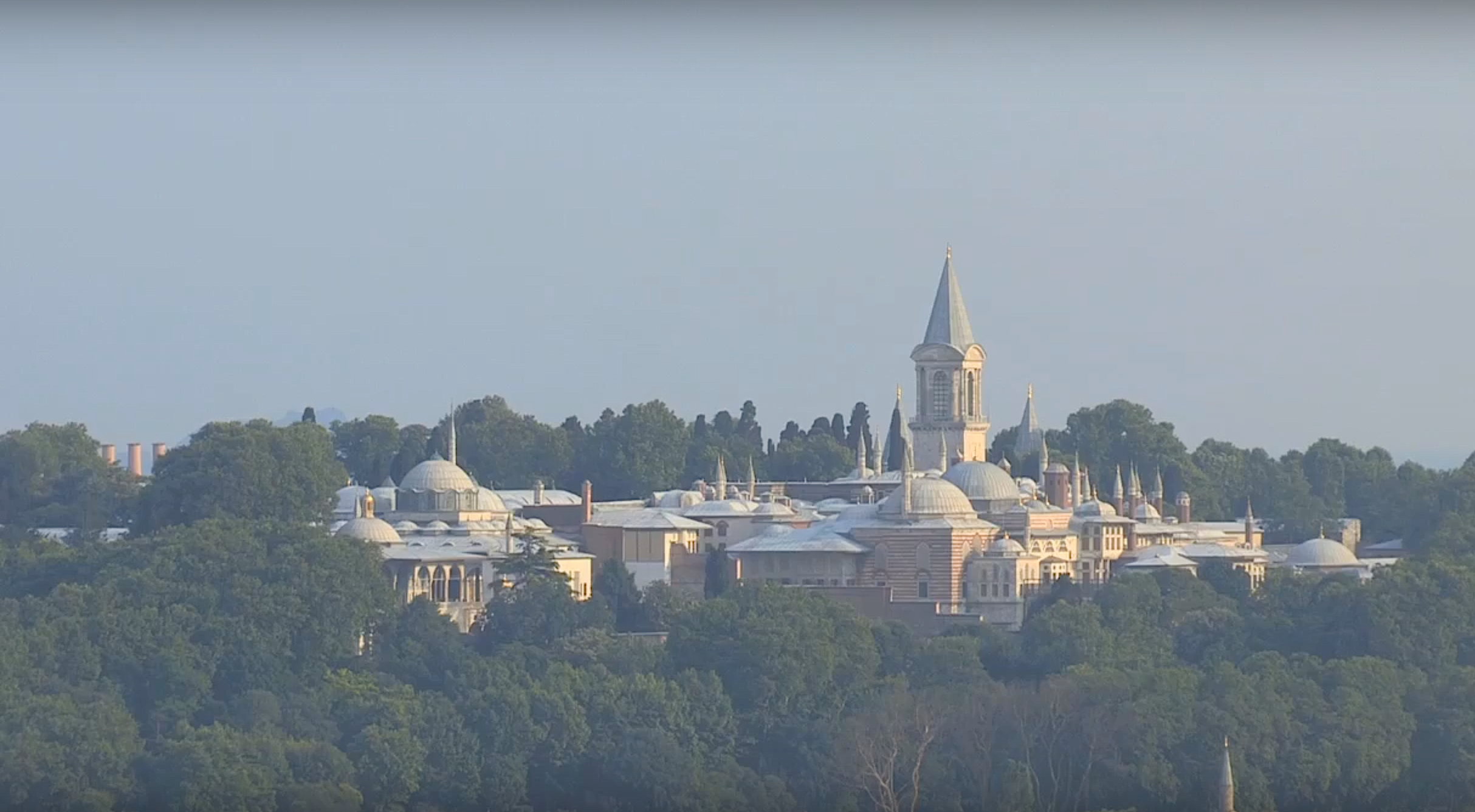 Palais de Topkapi vu d'en face